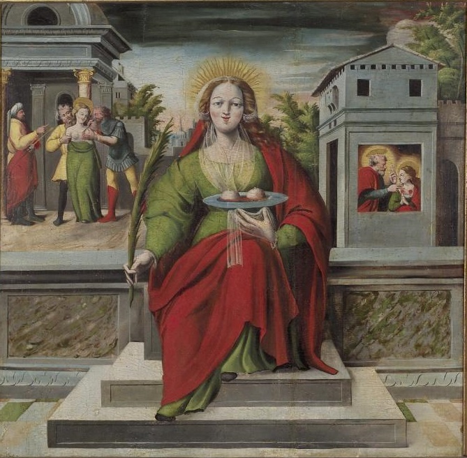 La obra representa a la mártir cristiana Santa Águeda.